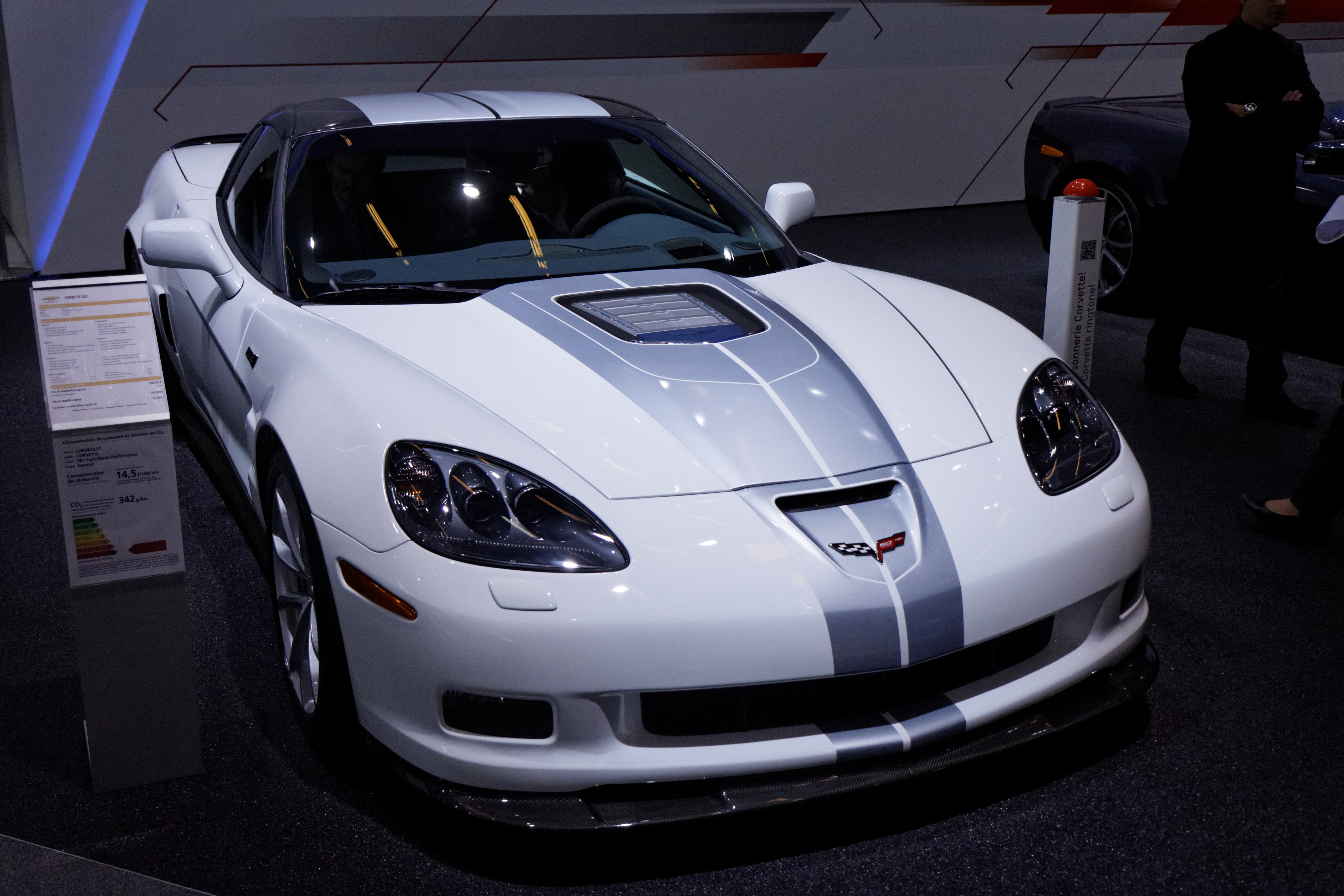 Une Chevrolet Corvette présentée lors du Mondial de l'automobile de Paris 2012.